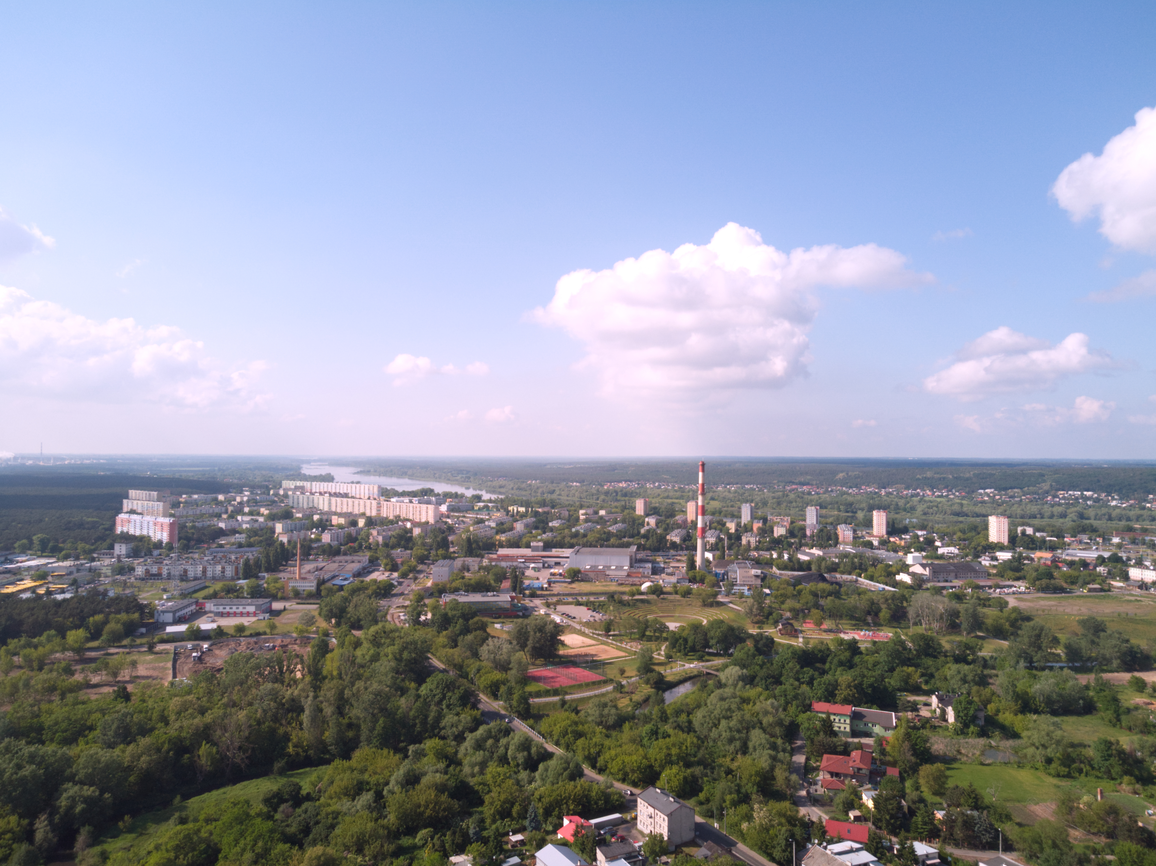 Zazamcze (2020 r.)